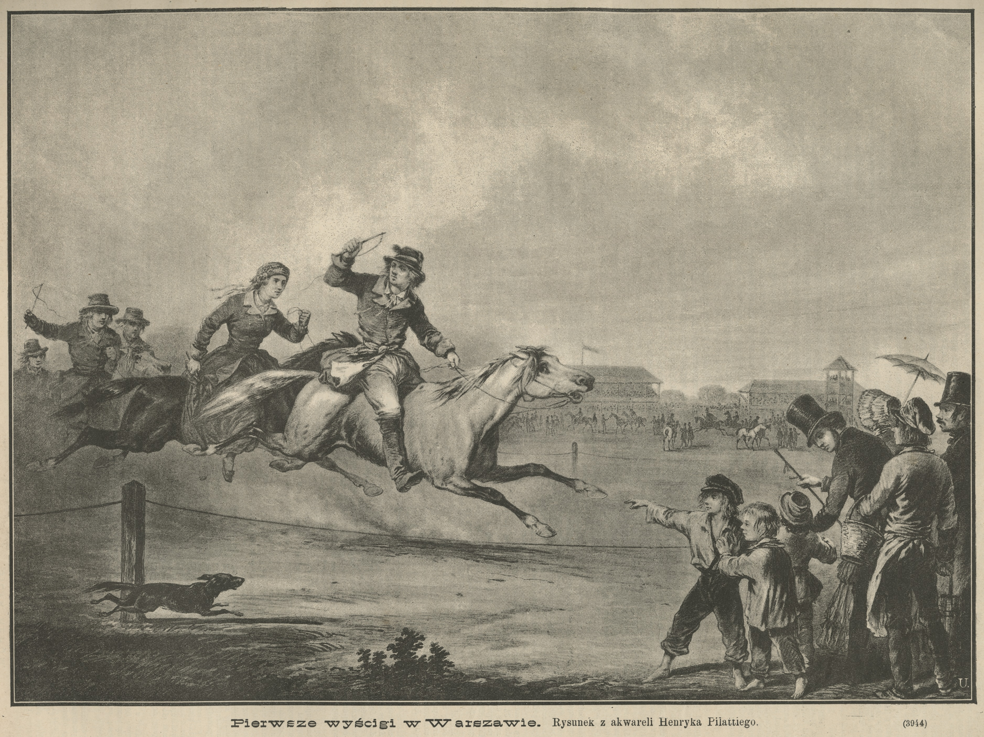 Pierwsze wyścigi w Warszawie